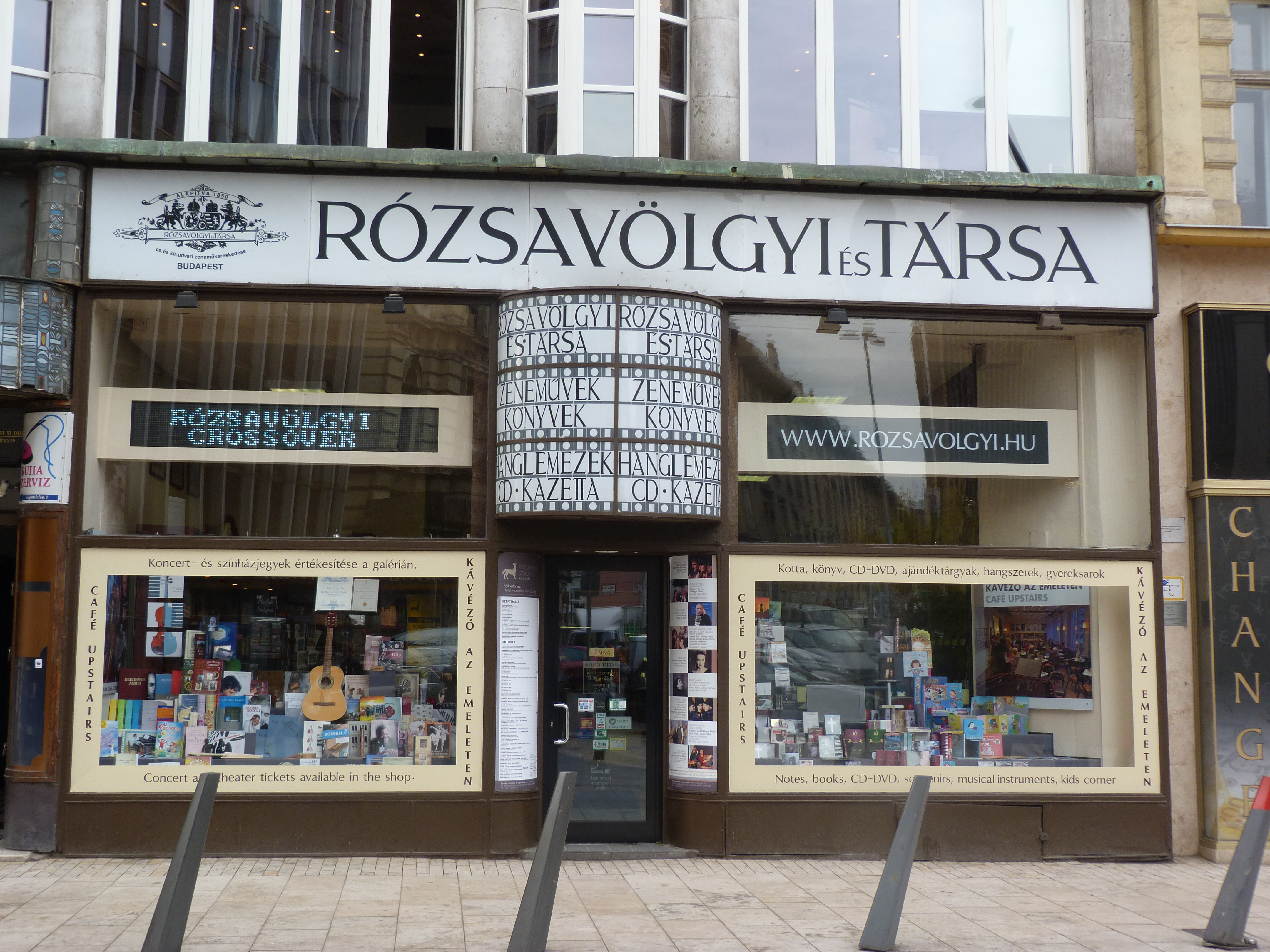 A felvétel 2013. október 21 –én hétfőn készült. Budapest Belvárosa. Szervita tér.